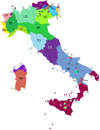 Situazione linguistica nell'Italia odierna con le isole linguistiche eteroglosse e alloglosse